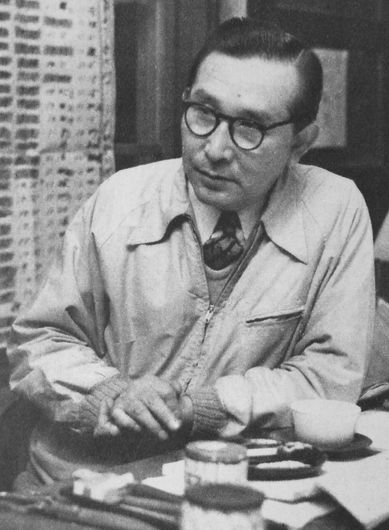 本郷保雄（週刊明星編集長）